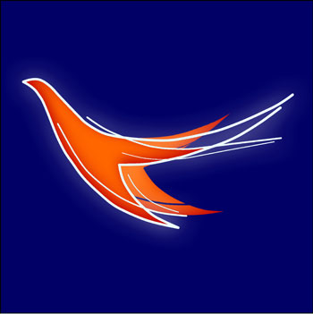 Nel 2009, con Decreto del Presidente del Consiglio dei ministri, il Sistema di informazione per la sicurezza della Repubblica ha adottato un proprio logo, con specifiche modalità di uso al fine di tutelarne il valore istituzionale e simbolico. Nelle parole degli architetti Massimiliano e Doriana Fuksas, che ne sono stati ideatori e realizzatori, il logo si pone come “un simbolo di leggerezza e di libertà che attraverso un segno unico, fluido e ininterrotto rappresenta la rapidità con cui le informazioni convergono da più organismi a quello centrale”. In tal modo esso riesce, non solo a svolgere la sua funzione distintiva di identificazione e di riconoscimento del Sistema nelle sue diverse componenti, ma riunisce queste ultime in un insieme armonico e dinamico, ciascuna con le proprie funzioni e peculiarità, unite nell’obiettivo comune di garantire l’informazione per la sicurezza a salvaguardia della Repubblica e delle istituzioni democratiche. Il logo può essere utilizzato, ai fini di identificazione distintiva e di riconoscimento, dalle istituzioni componenti il Sistema di informazione per la sicurezza della Repubblica così come identificate nell’art. 2 comma 1 della legge 124/2007. Il DIS ne cura anche l’uso nell’ambito delle attività di comunicazione istituzionale e di promozione e diffusione della cultura della sicurezza.